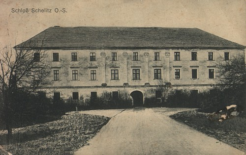 widok z okresu międzywojennego na chrzelicki zamek od strony północnej